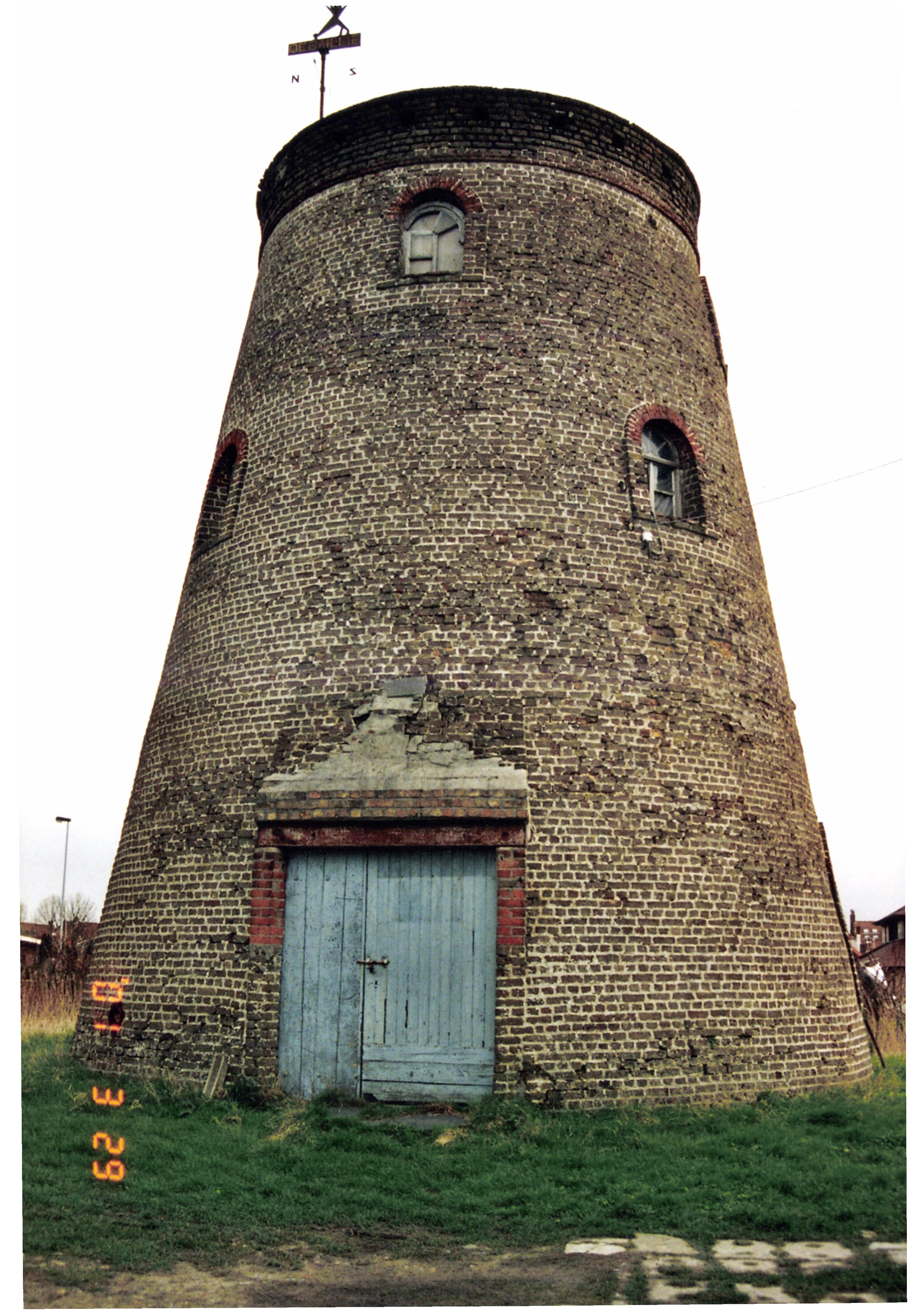 Site van de windmolen Groenhagemolen